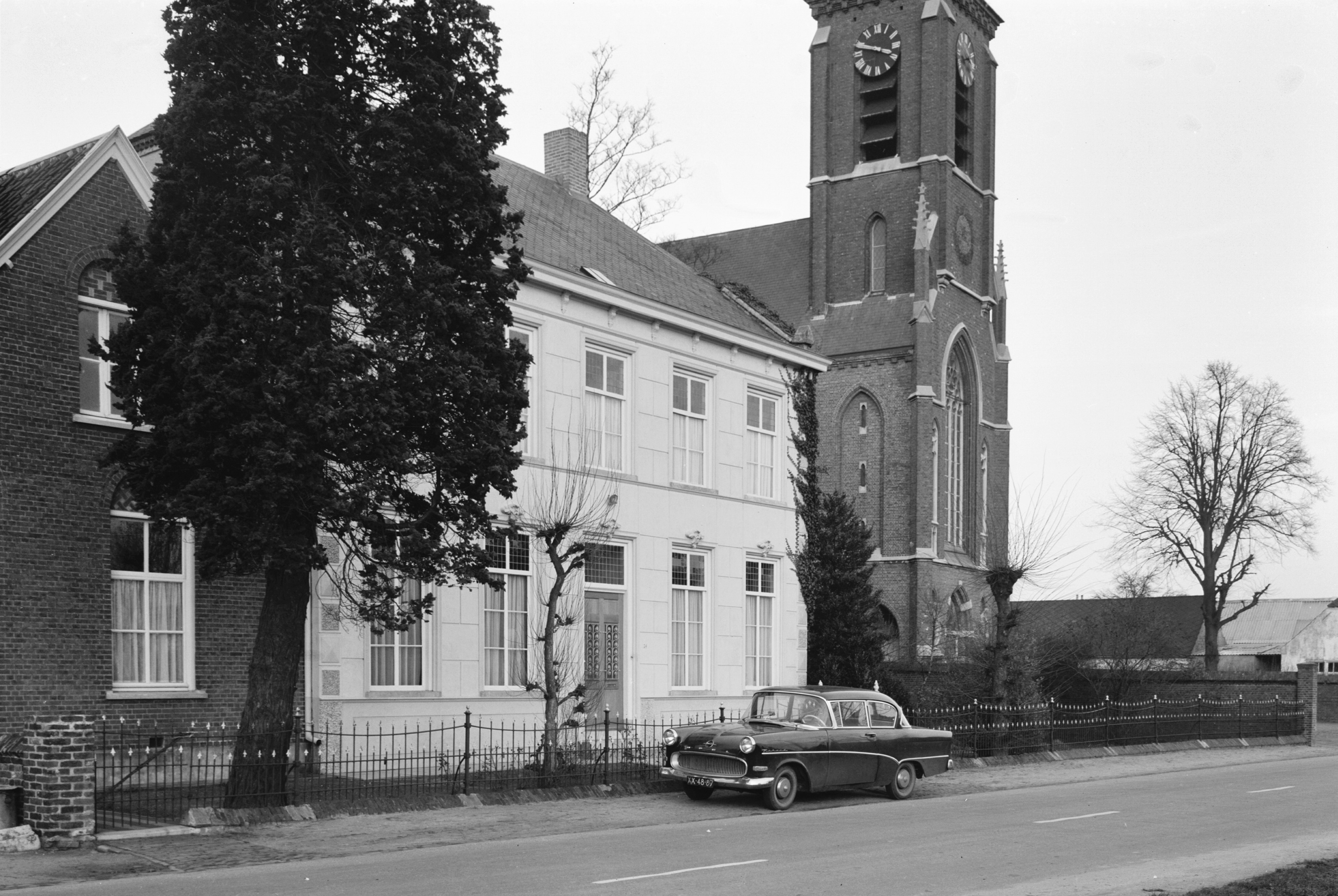 Dorpsstraat 24, aanzicht